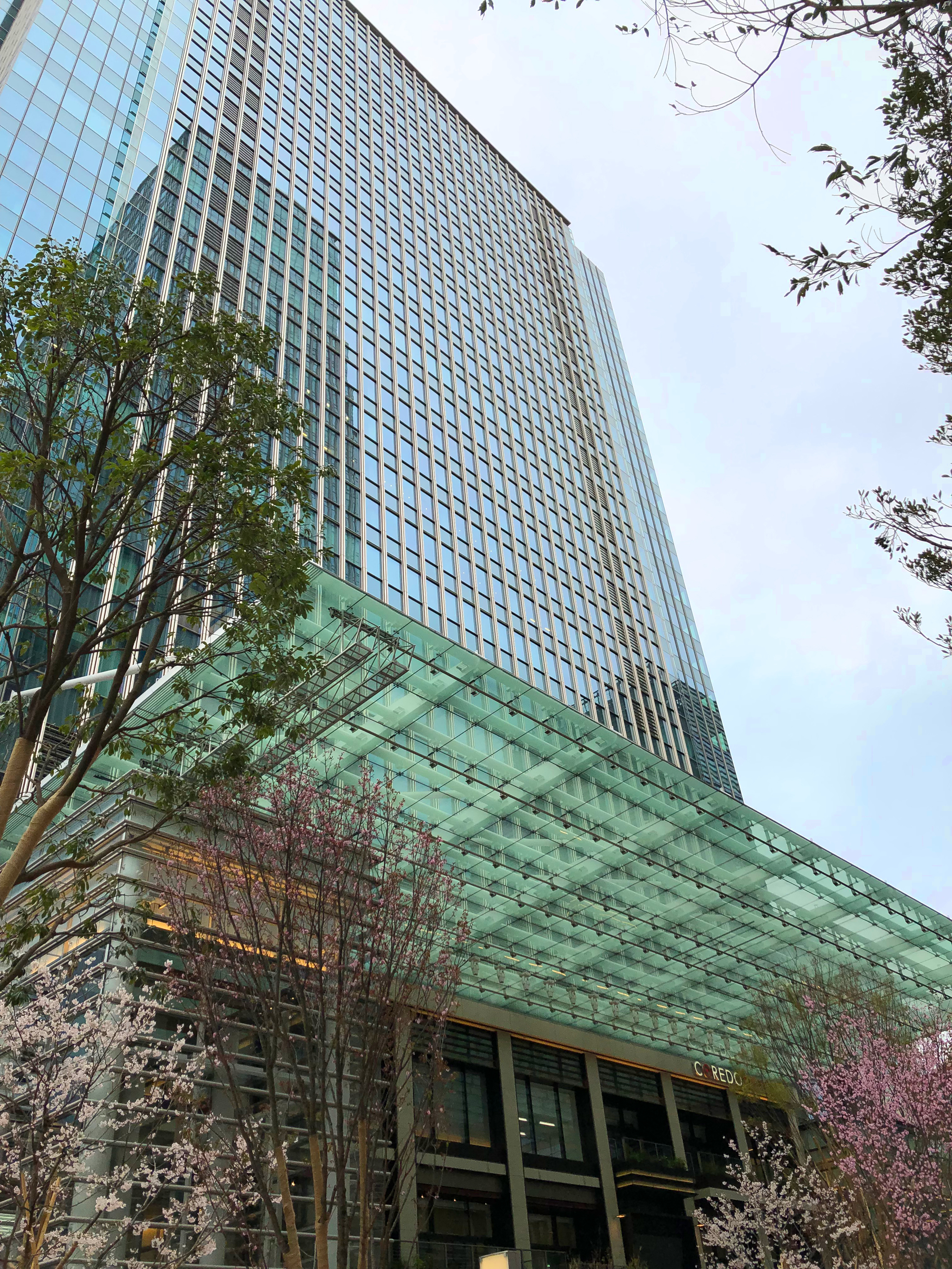 新本社オフィスの入る日本橋室町三井タワー